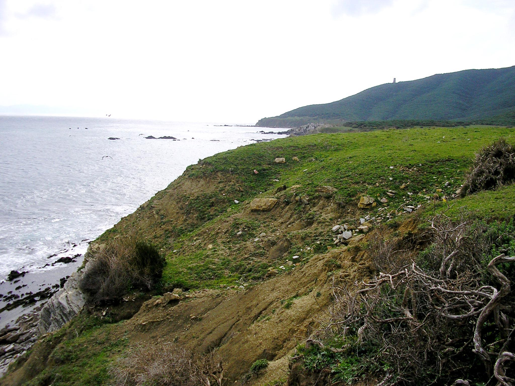 Cala Arena, al fondo la Torre de Los Canutos, en Algeciras, Andalucía, España